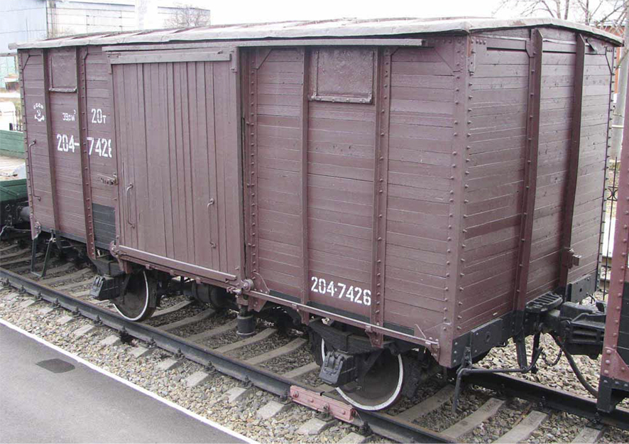 Вагон построен в 1920-х годах